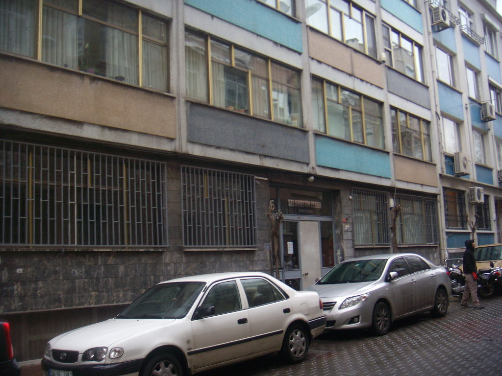 Kapıcılar Kralı filminin çekildiği apartman